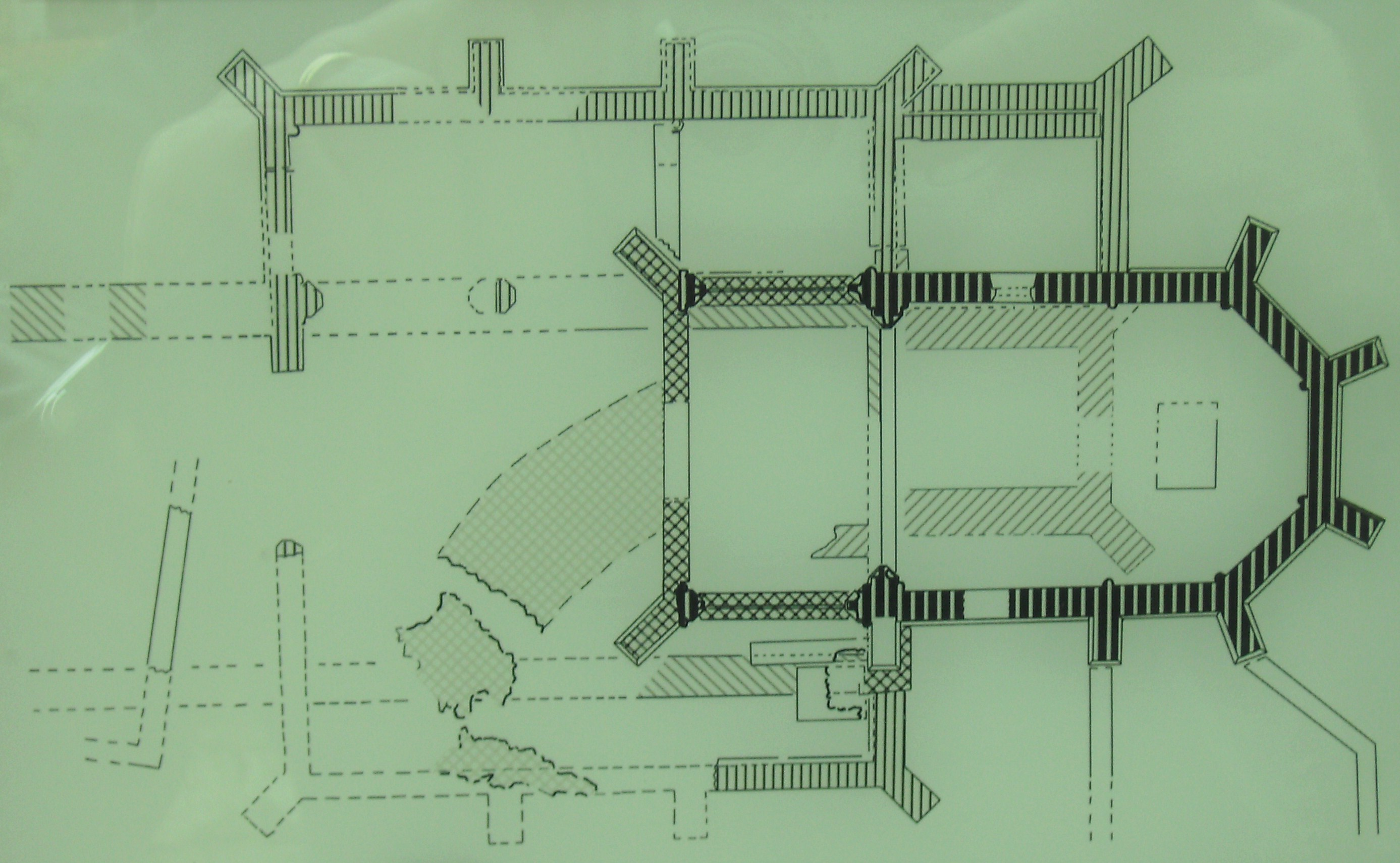 Wintringen: Kapelle (Grundriss der verschiedenen Ausbaustufen)